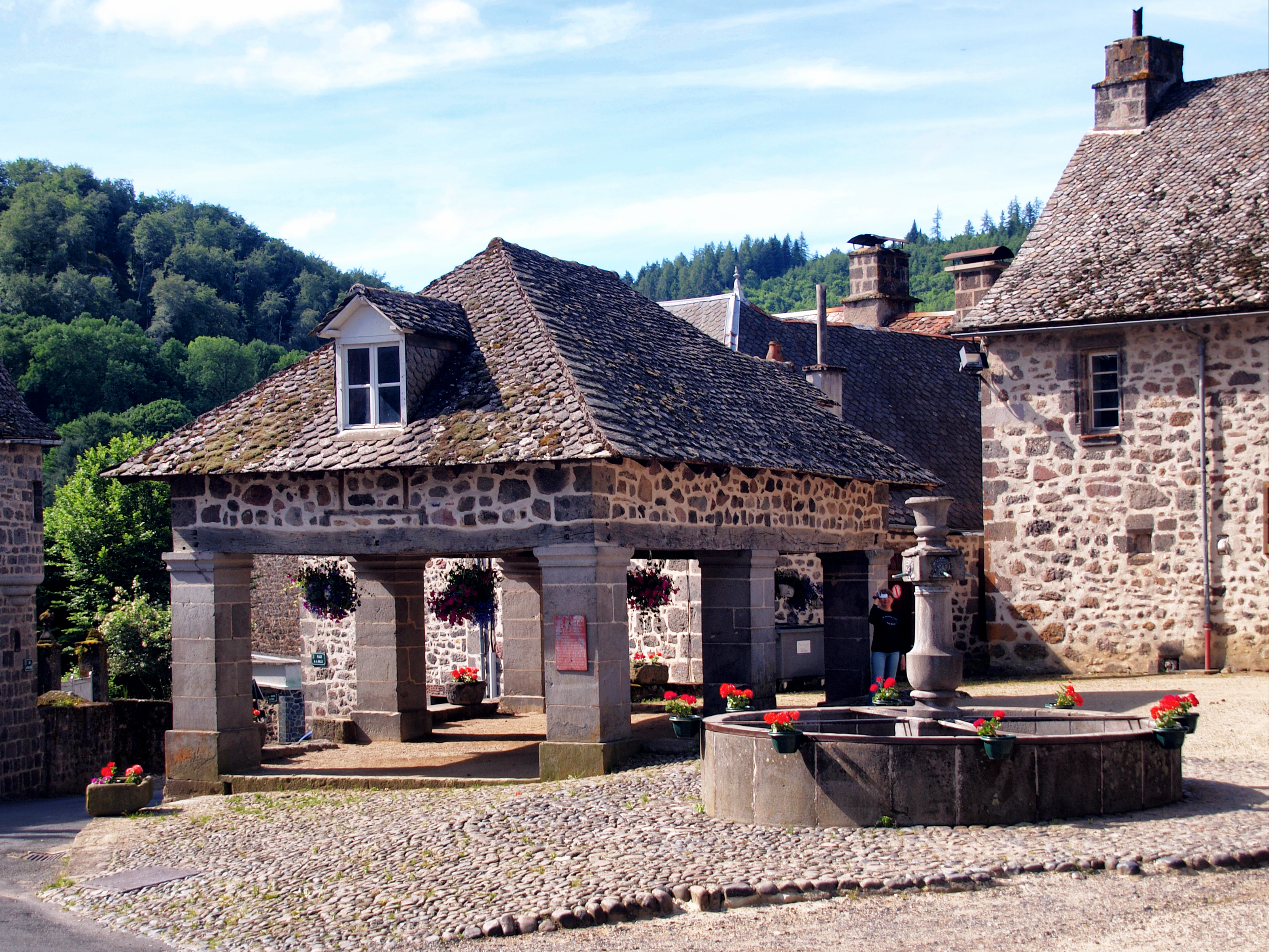 Saint-Martin-Valmeroux, Cantal (Auvergne-Rhône-Alpes) - La Halle, construite au XVIIe siècle avec des matériaux du pays .